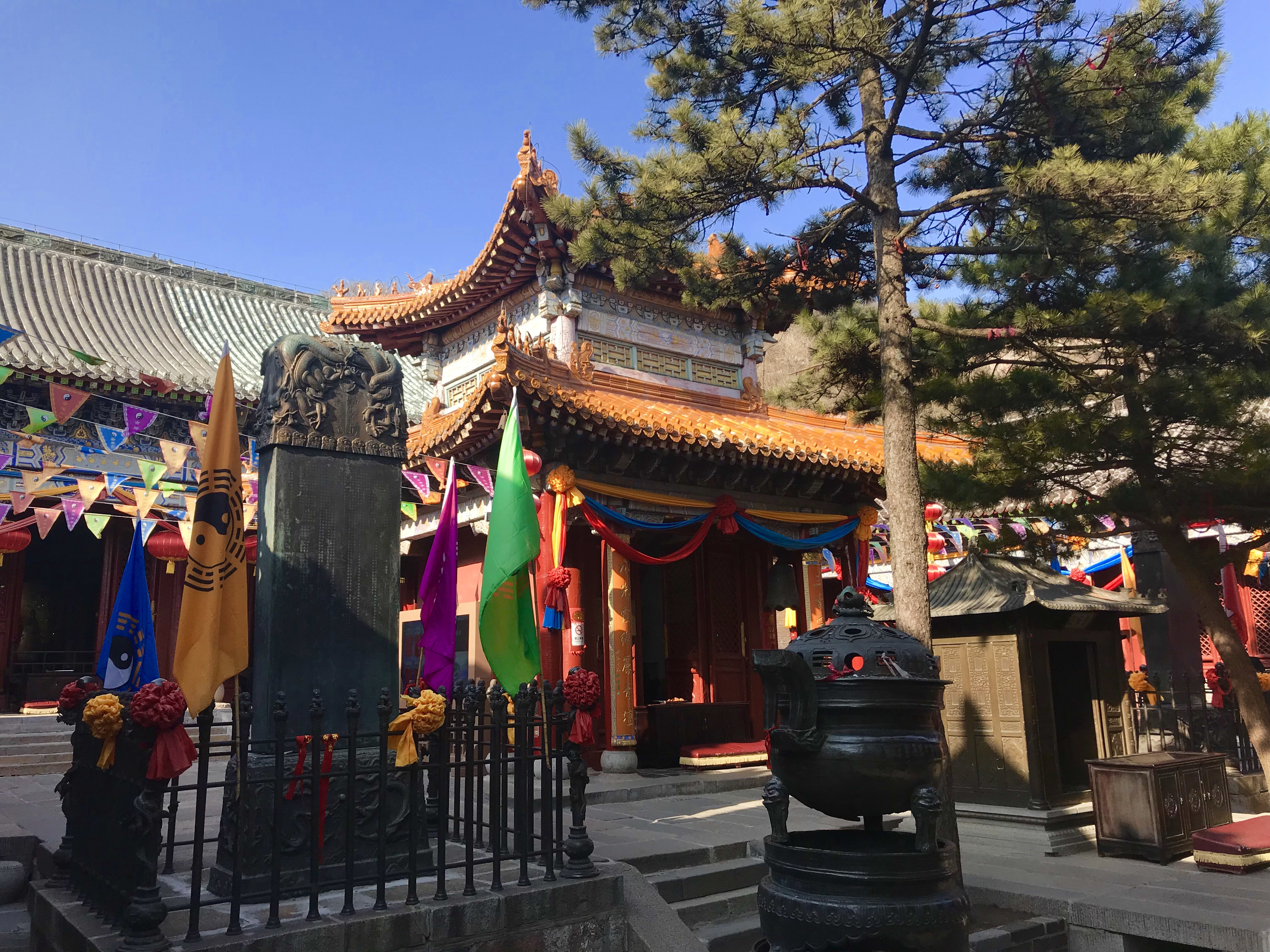 中文（台灣）: 泰山碧霞祠香亭